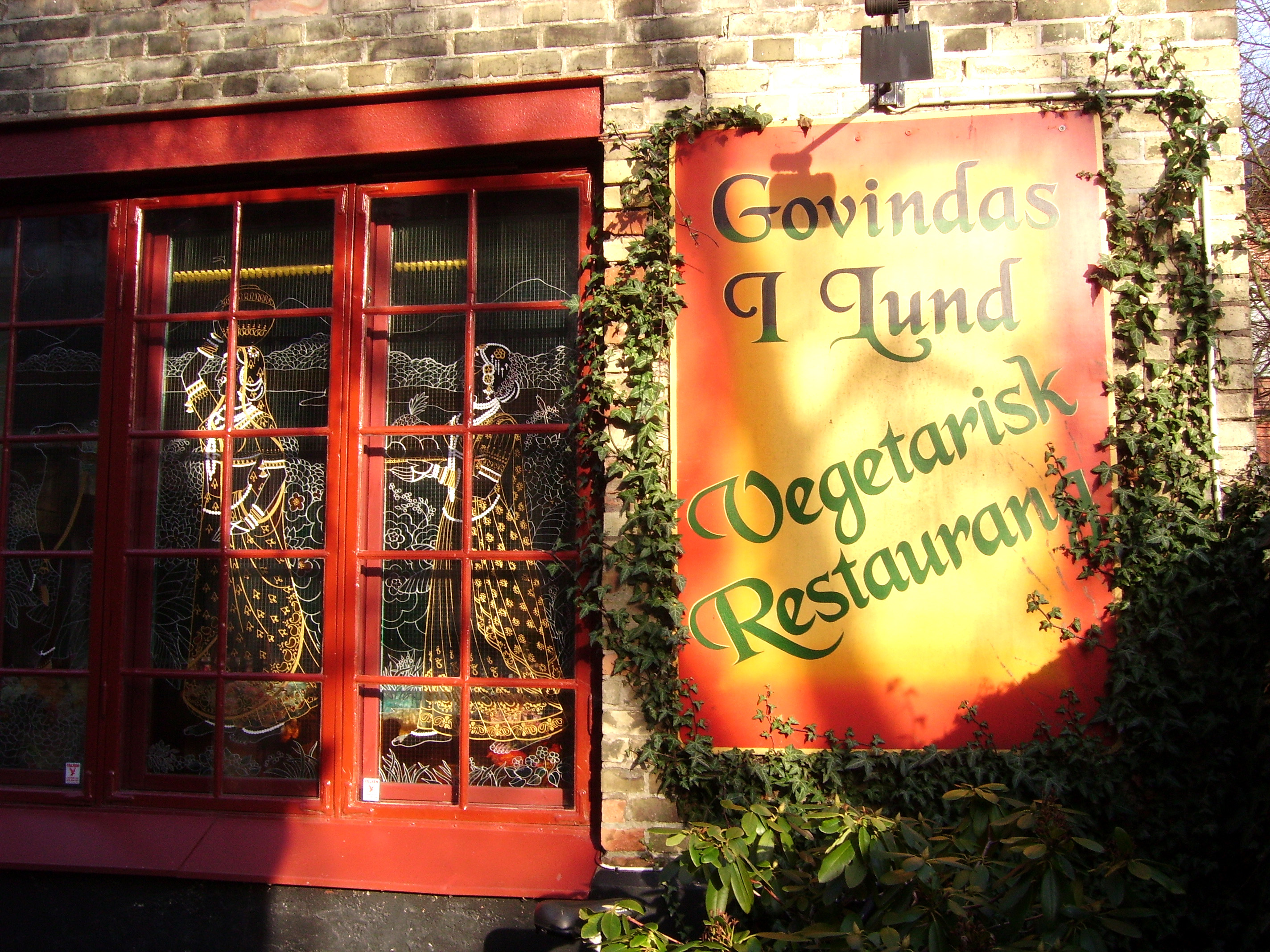 Restaurant Govindas in Lund, Sweden